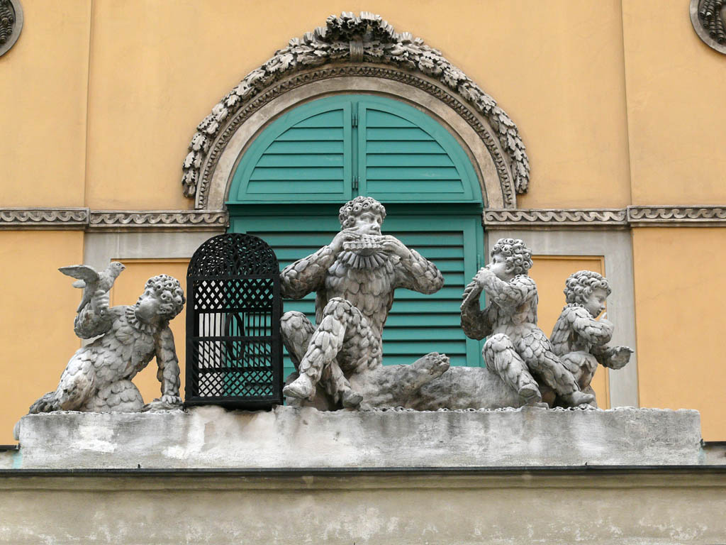 Papagenotor, detail